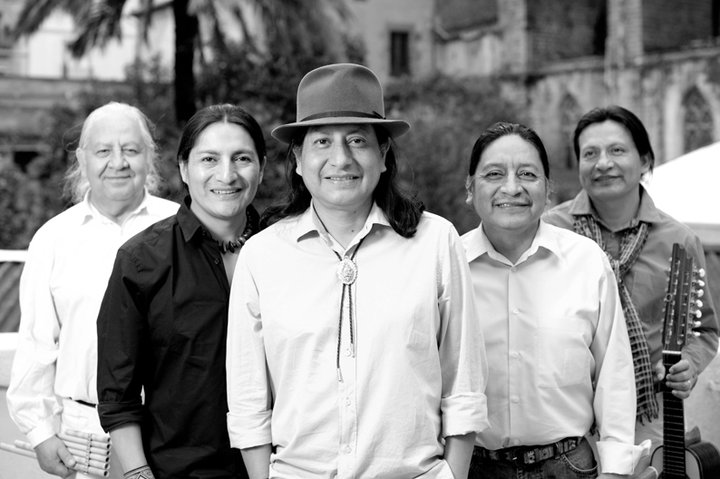 Grupo Charijayac